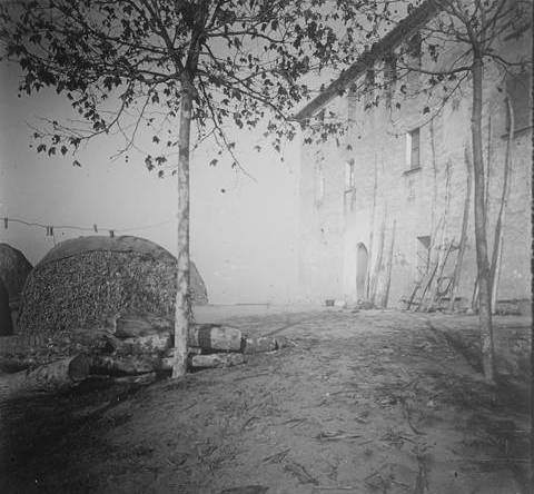 Vista d ' una masia de Reixac , poble i antiga parròquia (Sant Pere de Reixac) del municipi de Montcada i Reixac (Vallès Occidental) , centrat per l'església de Sant Pere (191 m alt) , a l'esquerra del Besòs , al sector muntanyós que limita amb els contraforts de la Conreria .